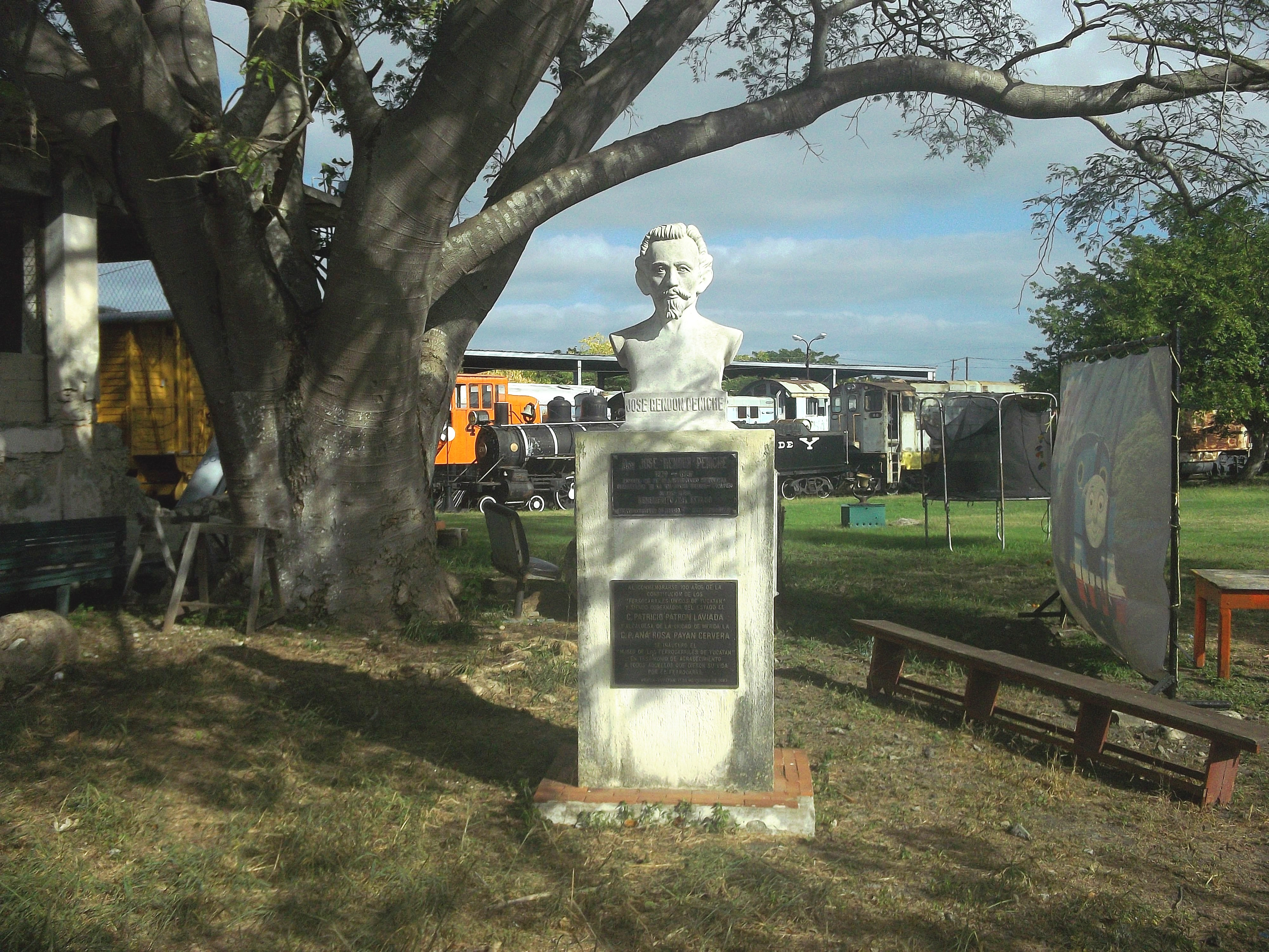 Busto de José Rendón Peniche, Mérida, Yucatán.